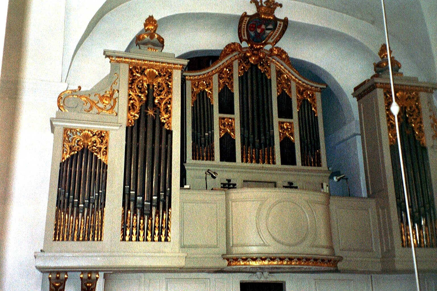 Herbst-Orgel, Lahm/Itzgrund 1732